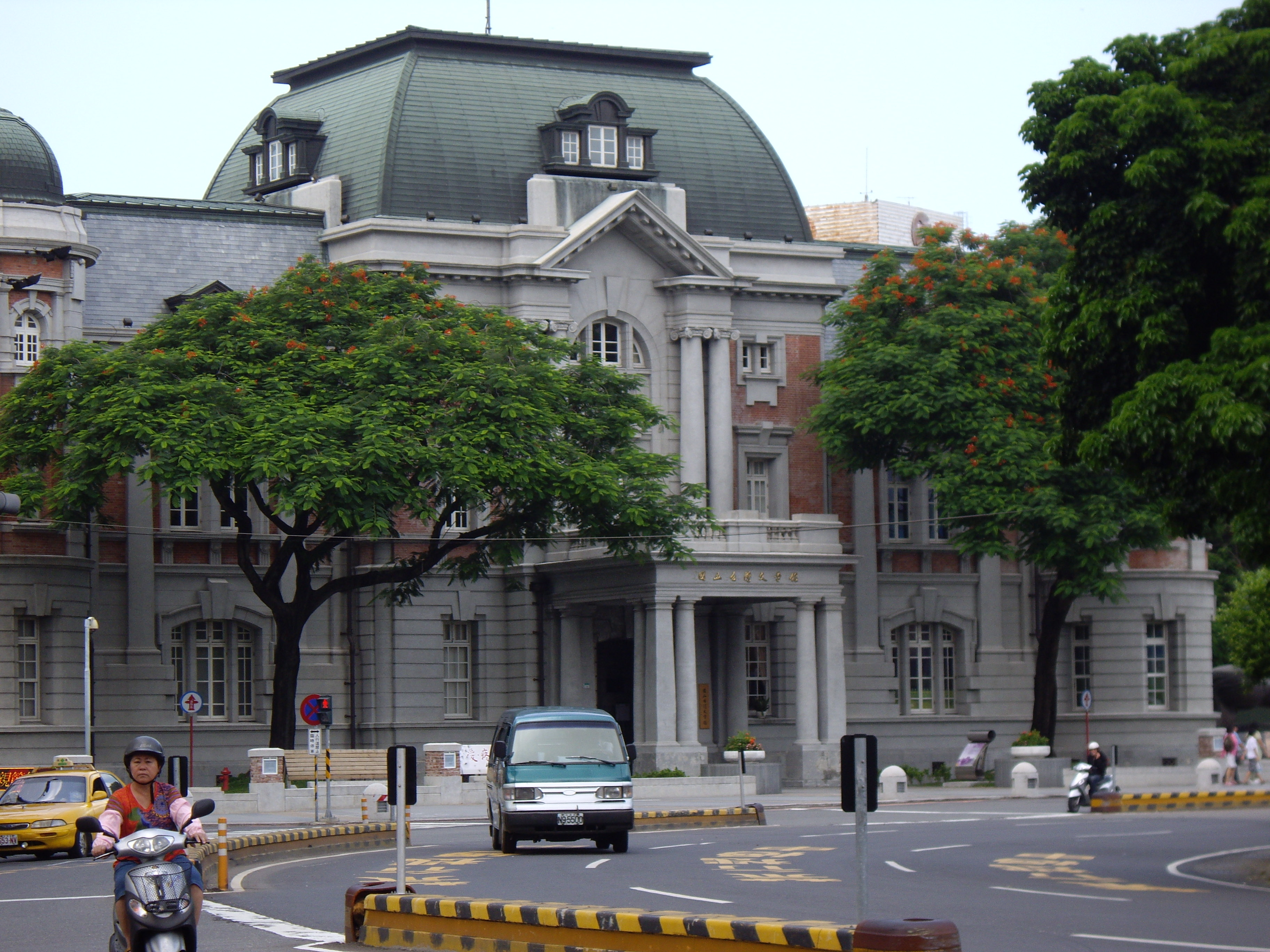 國家台灣文學館